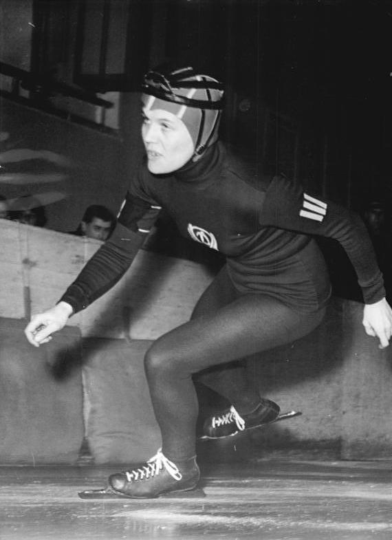 Helga Haase Zentralbild Kohls 25.3.1962 Deutsche Meisterschaften im Eisschnellauf (Kleinbahn) In der Berliner Werner-Seelenbinder-Halle wurden am 24.u.25.3.1962 die Deutschen Meisterschaften im Eisschnellauf auf Kleinbahn ausgetragen. UBz: Helga Haase gewann den 500-m-Lauf überzeugend und wurde damit Deutsche Meisterin. Abgebildete Personen: Haase, Helga: Eisschnelläuferin, Ehefrau von Helmut Haase, DDR